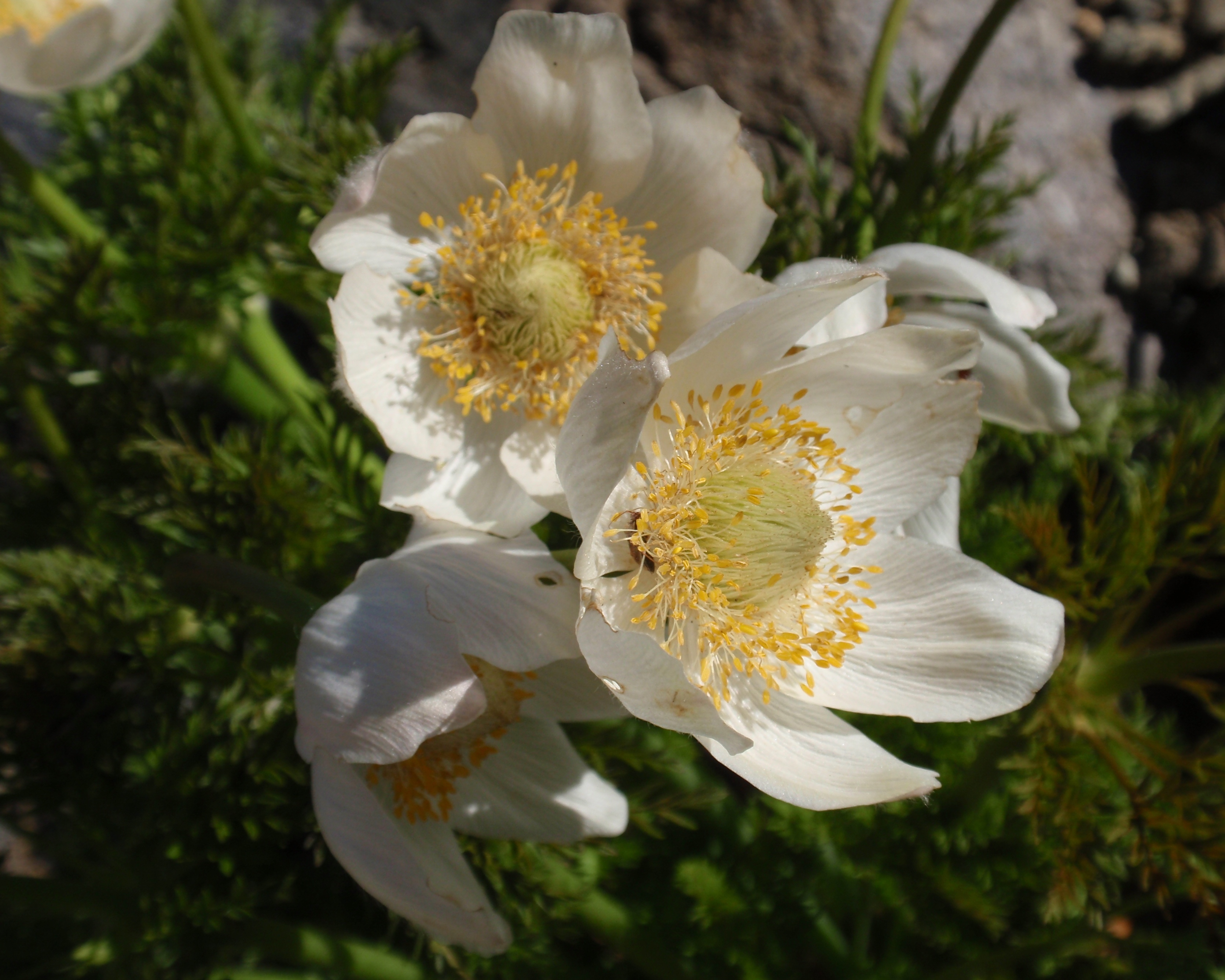 Pulsatilla occidentalis (syn. Anemone occidentalis) Western Pasque Flower 07